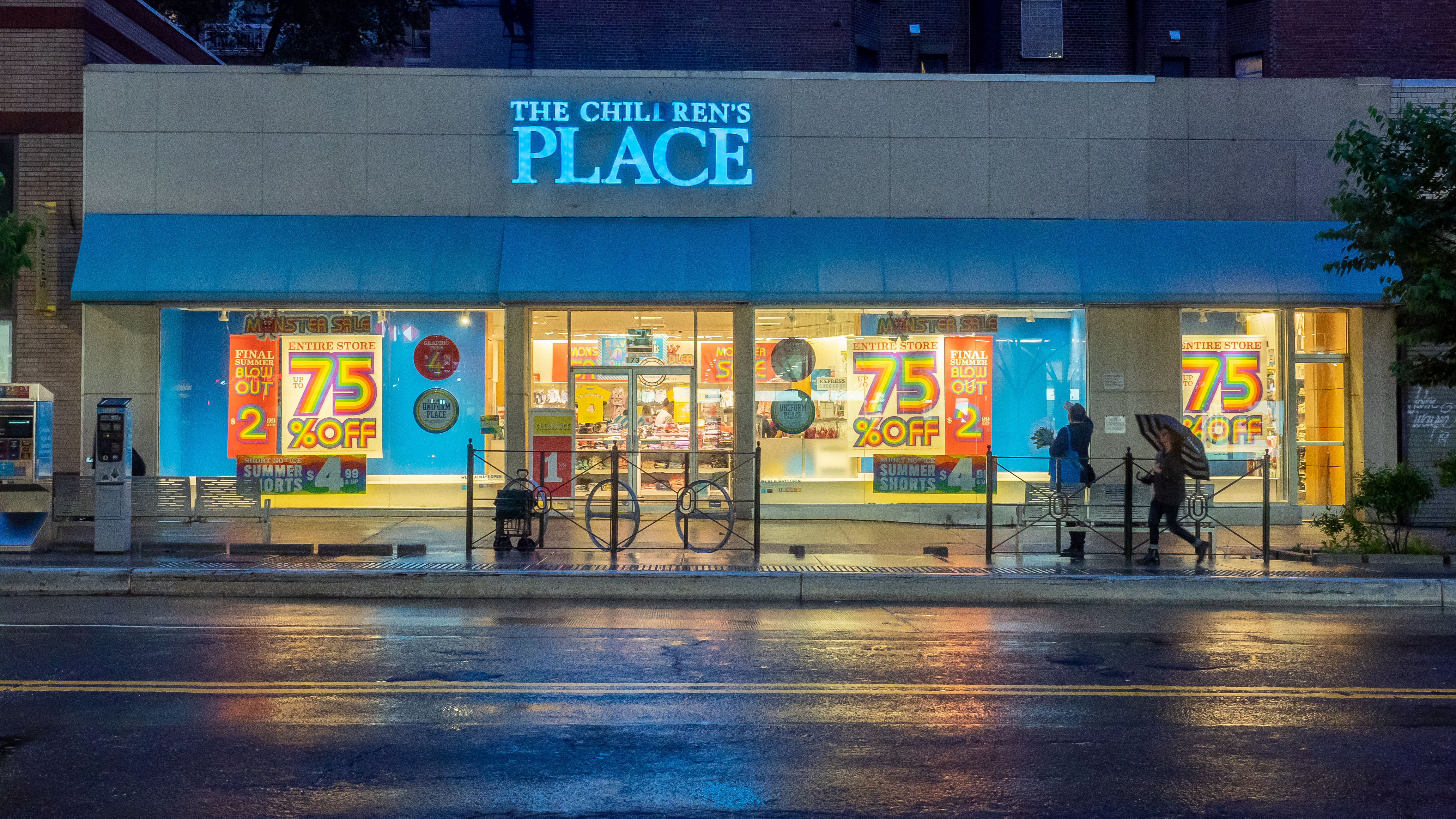 Upper East Side, NYC